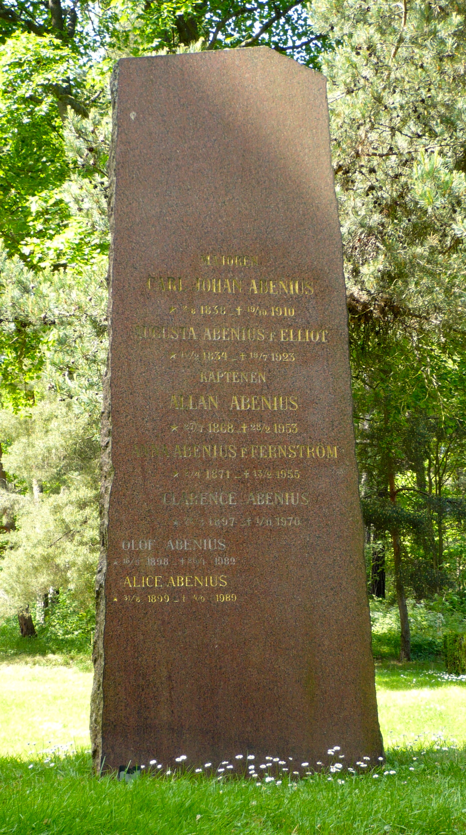 Gravsten för familjen Abenius, Norra begravningsplatsen, Solna.